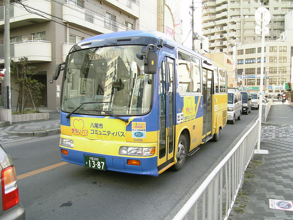 八尾市「愛あいバス」（日野・リエッセによる代車）